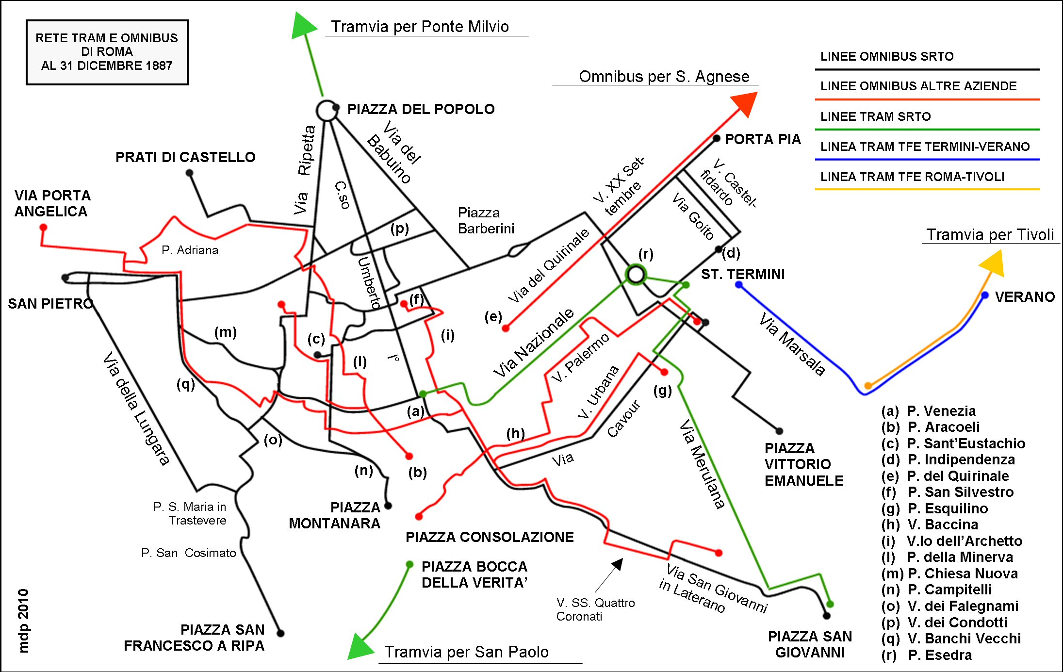 Rete trasporti pubblici di Roma, 1887